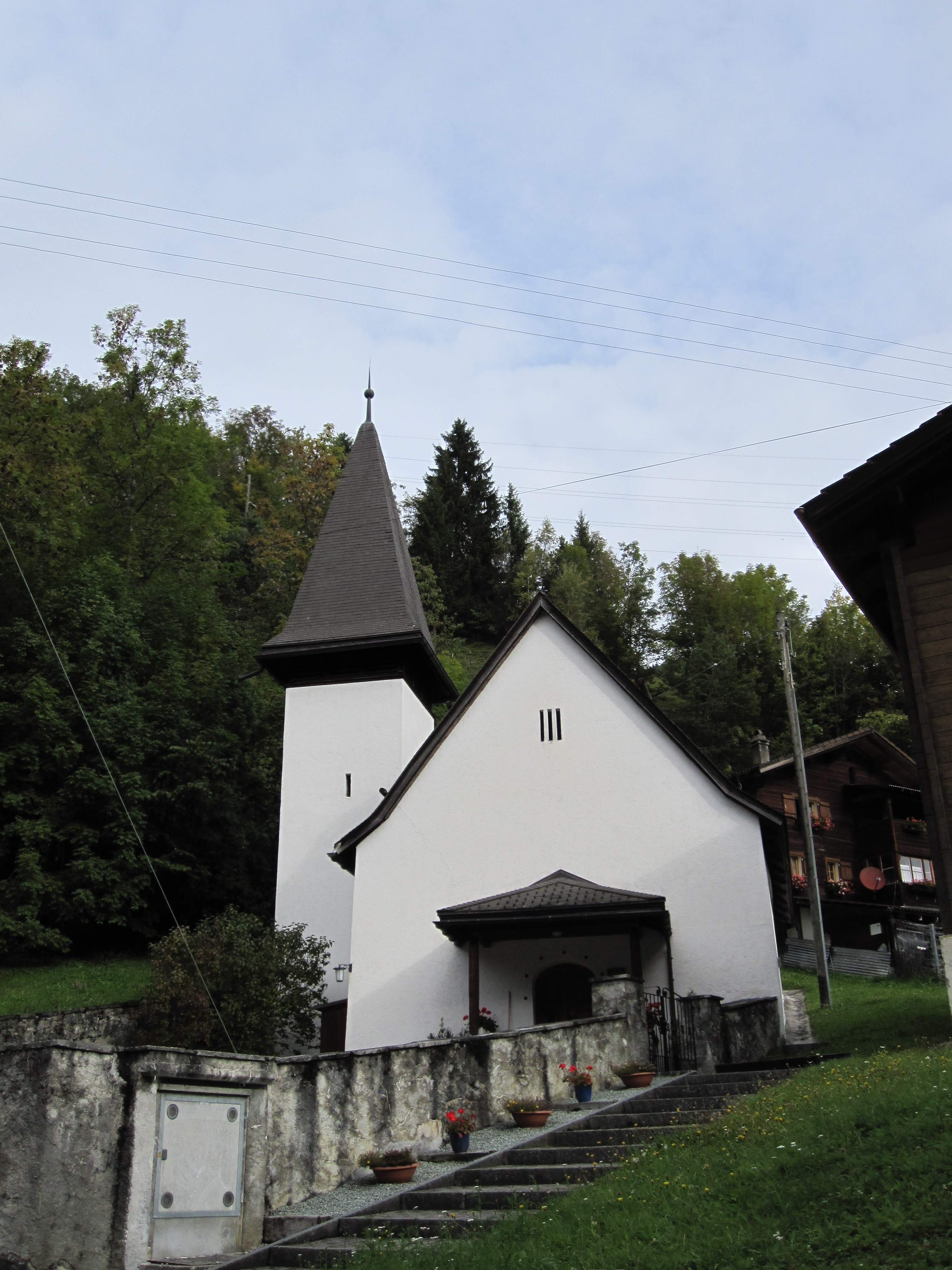 reformierte Kirche Molinis (Kanton Graubünden)